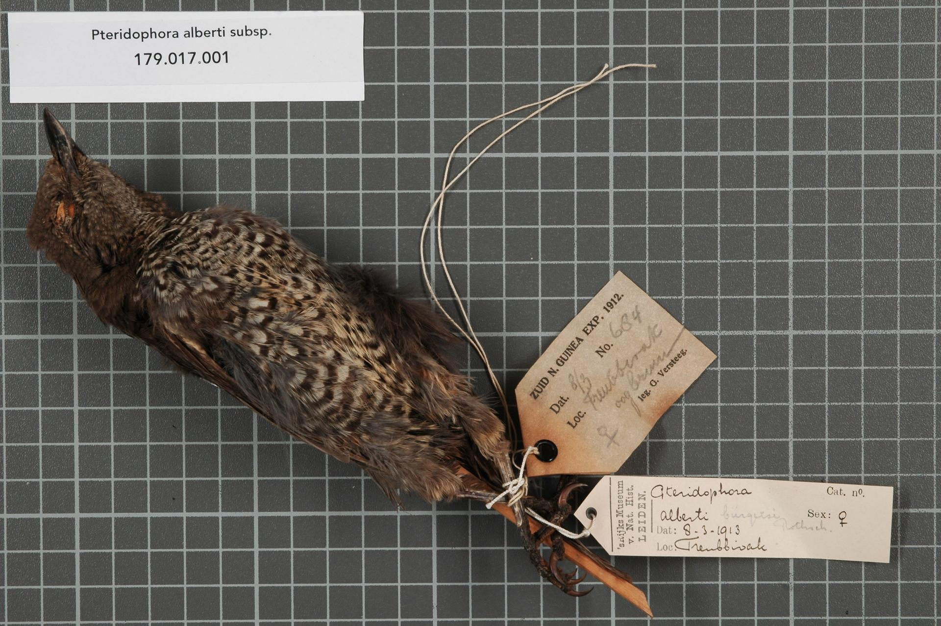 Pteridophora alberti subsp.